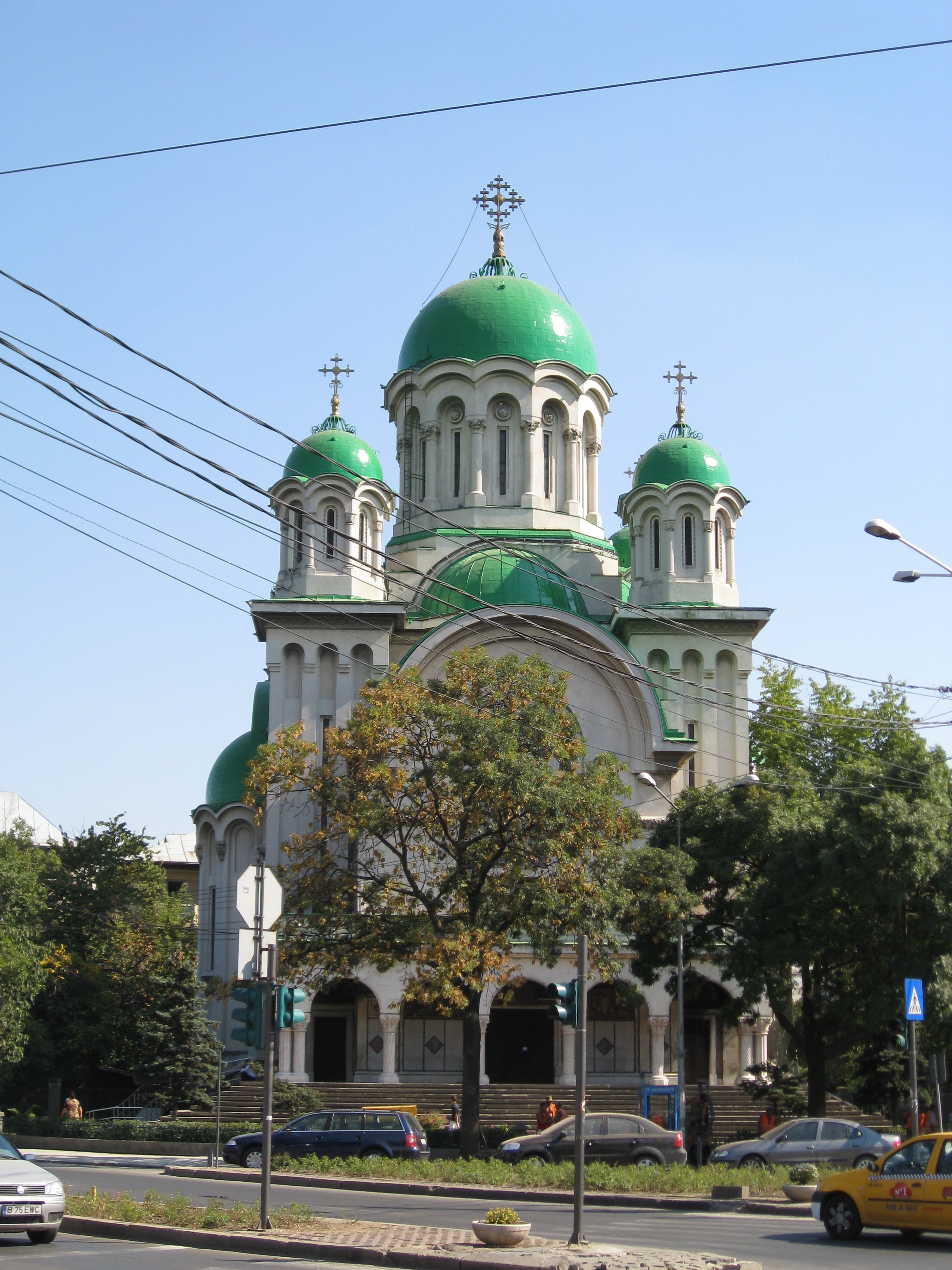 Caşin Church, Bucharest, Romania